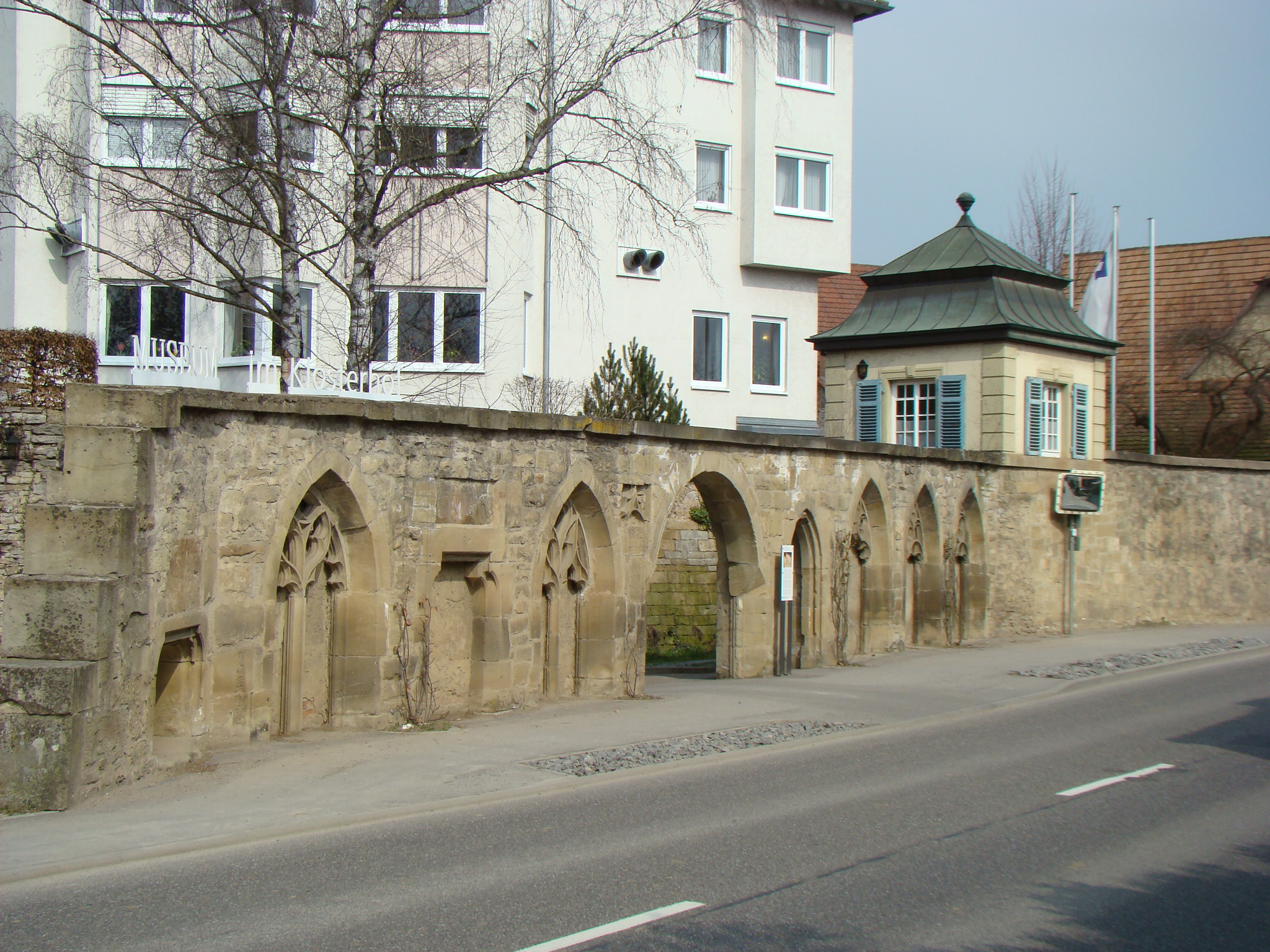 Mauer des Klosterhofs in Lauffen am Neckar